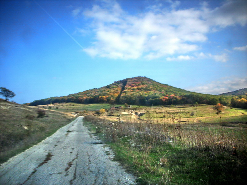 Хълмът Ойнарджа до село Дриново, в който се крият останките от античната крепост "Ойнарджа кале:.